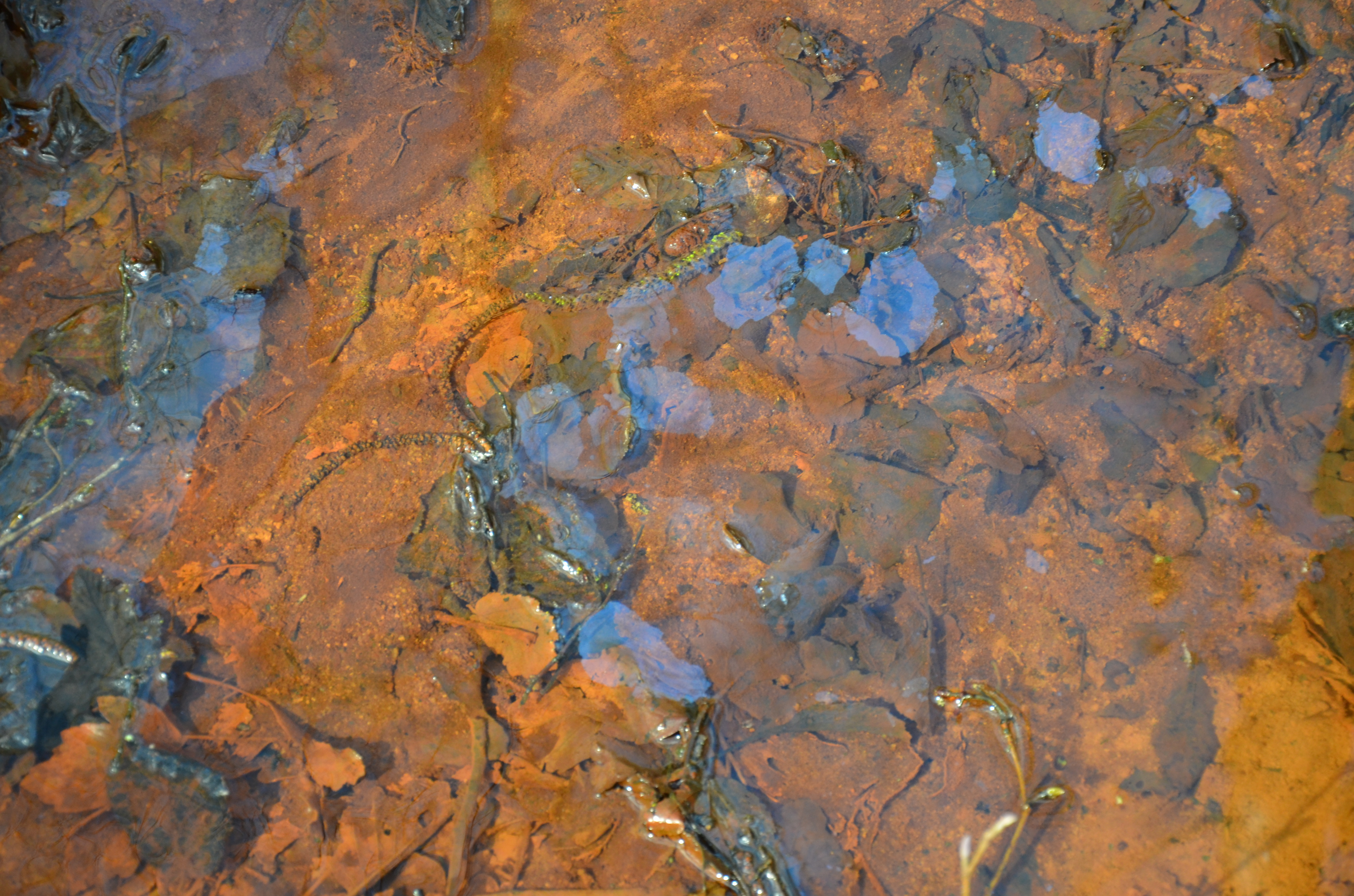 Infusoires, en surface d'une eau ferrugineuse et riche en feuilles mortes (eau issue de la nappe du sable du landénien), en Forêt domaniale de Flines-lès-Mortagne ; 2015-04-01